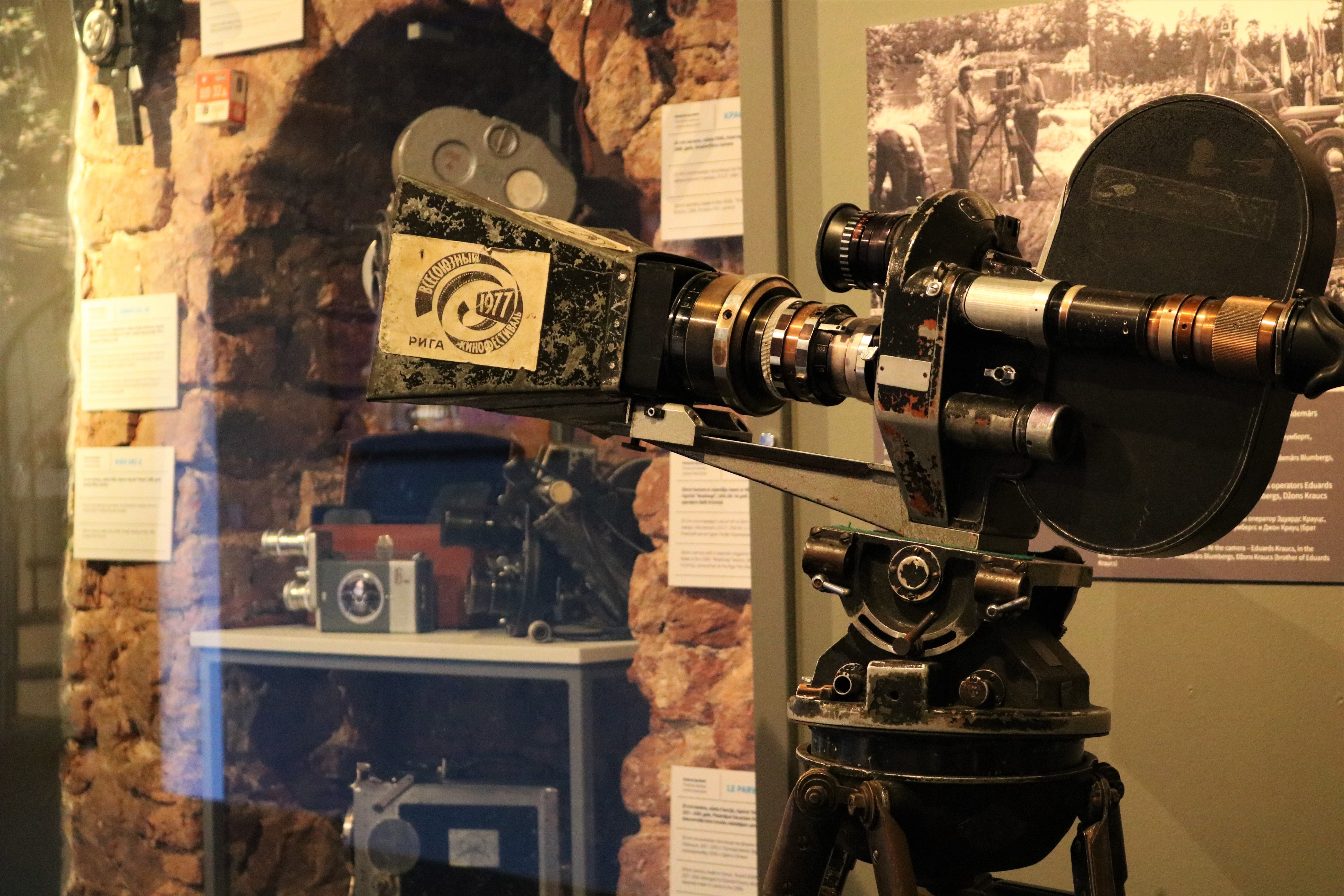 Ekspozīcija "Aizekrānija". Operatora Gvido Skultes kamera.